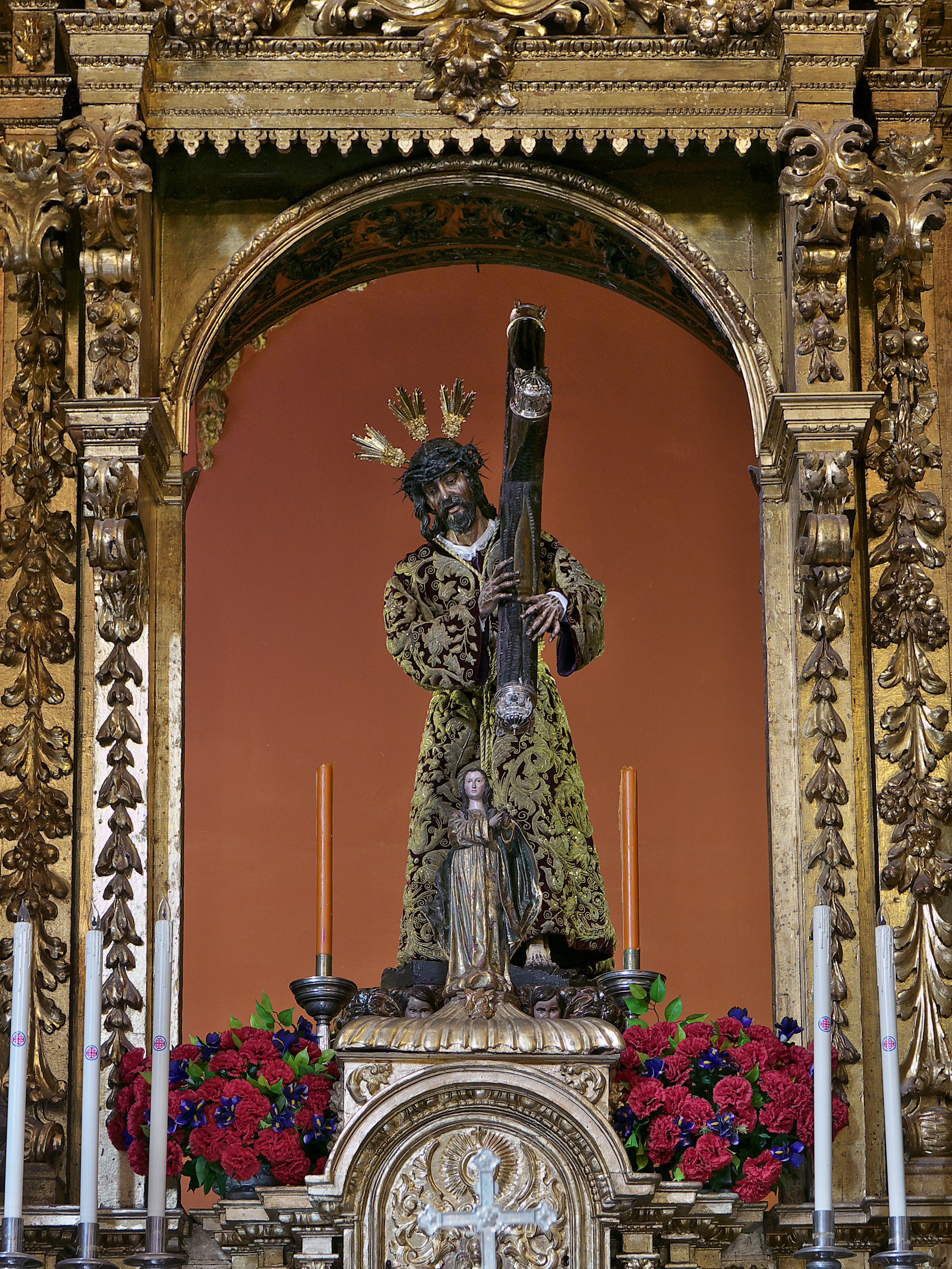 Imagen titular de la Pontificia, Ilustre y Muy Antigua Hermandad y Cofradía de Nuestro Padre Jesús Nazareno, Santa Cruz en Jerusalén, María Santísima de las Misericordias, San Juan Evangelista y San Francisco de Écija.